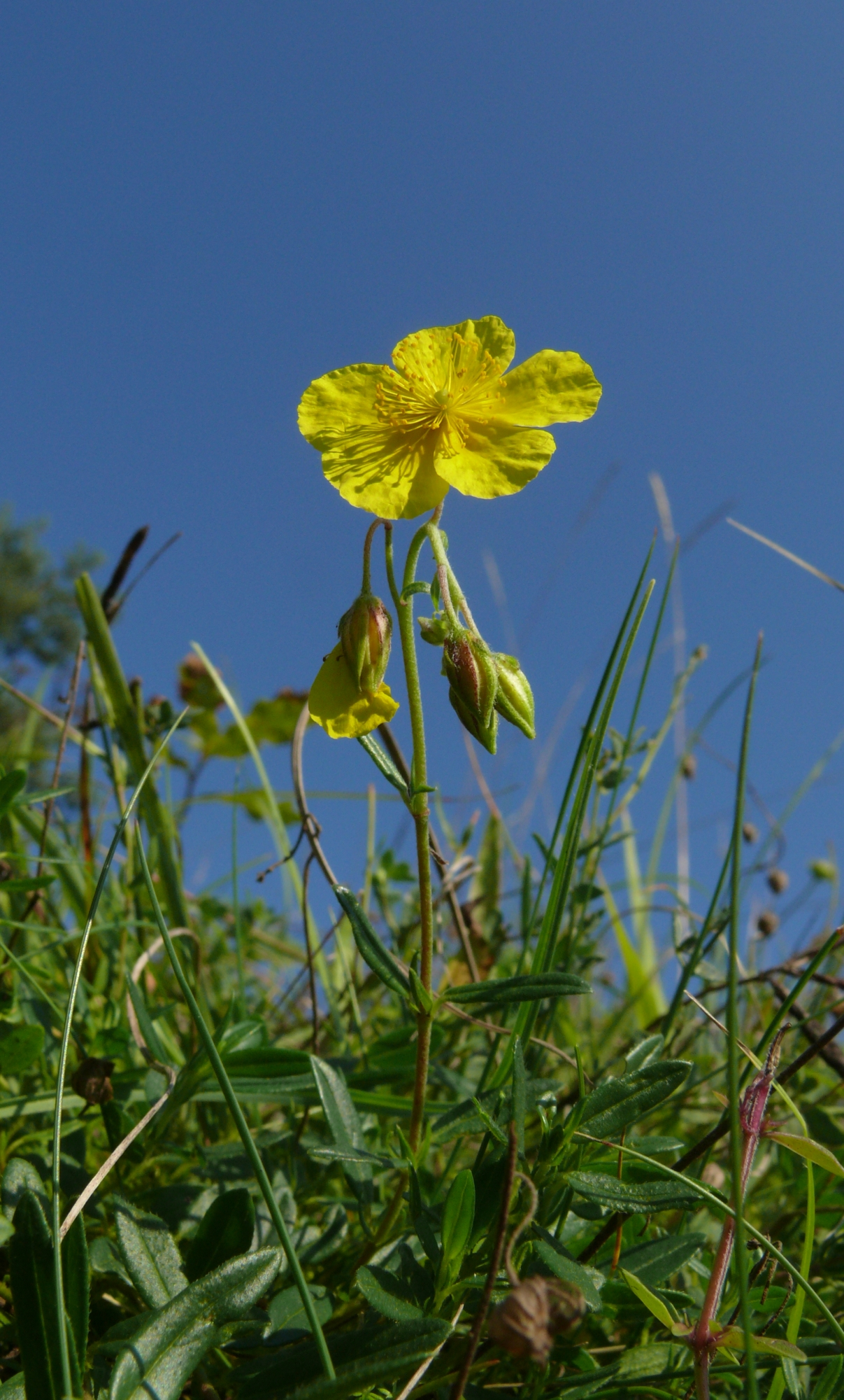 Helianthemum nummularium subsp. obscurum, Schwäbisch-Fränkische Waldberge, Germany